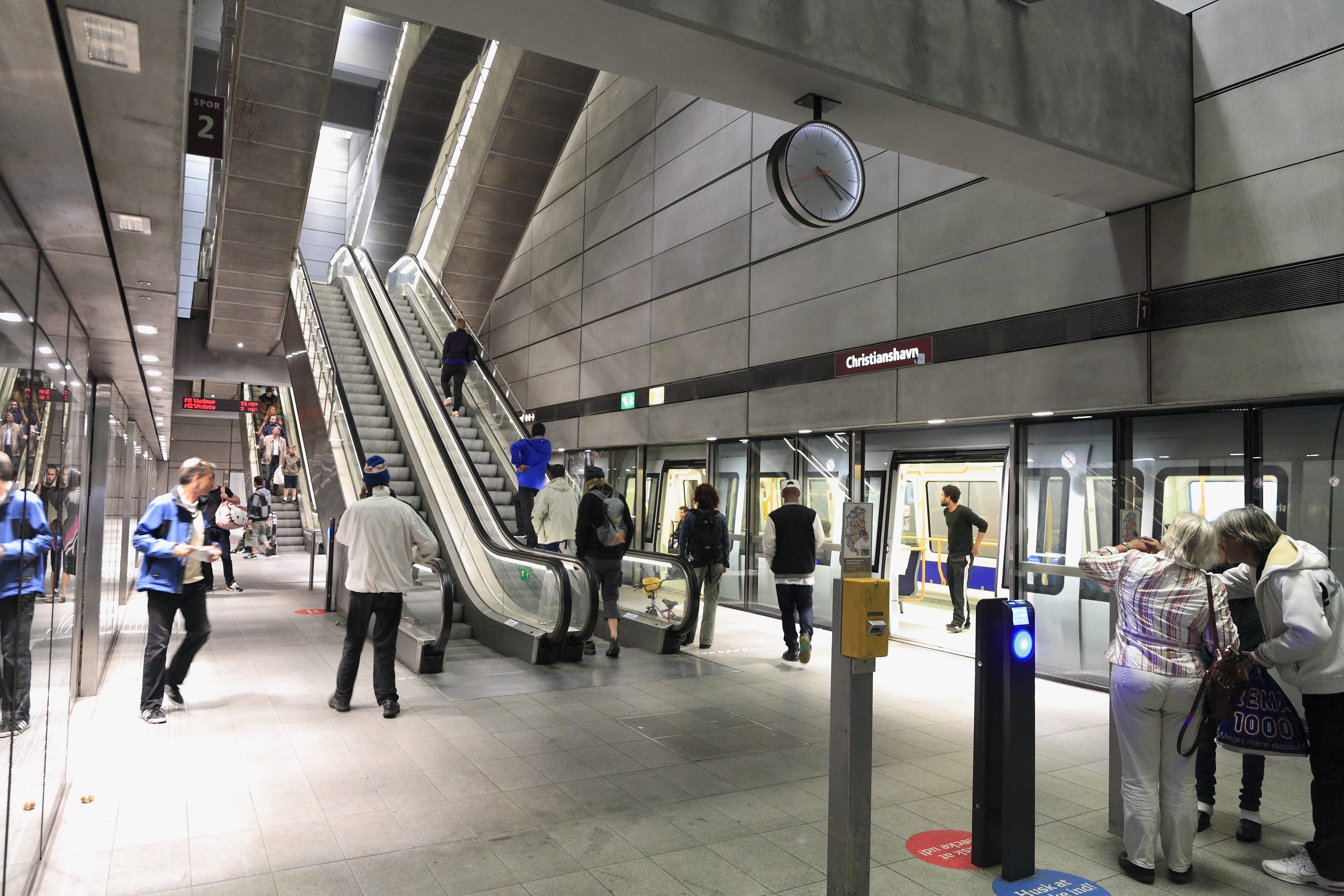 Standardbauweise von Kopenhagener U-Bahnhöfen im Tunnel mit mehreren Rolltreppen übereinander in einem Zugangsschacht direkt über dem Bahnsteig, getrennten Zu- und Abgängen und einer Verteil- und Fahrkartenverkaufsebene in einfacher Tiefenlage. Wegen des lokführerlosen Betriebes sind die Bahnsteigkanten mit Türen abgeschlossen, sie öffnen gemeinsam mit den Wagentüren. Die Haltegenauigkeit ist zumindest ausreichend. Die Tunnelstrecken liegen im Kopenhagener Zentrum aus topografischen Gründen weit unterhalb von Meeres- und Grundwasserstand. Die Fahrkartenentwerter stehen auf dem Bahnsteig, eine ausgesprochen fahrgastfreundliche Lösung.